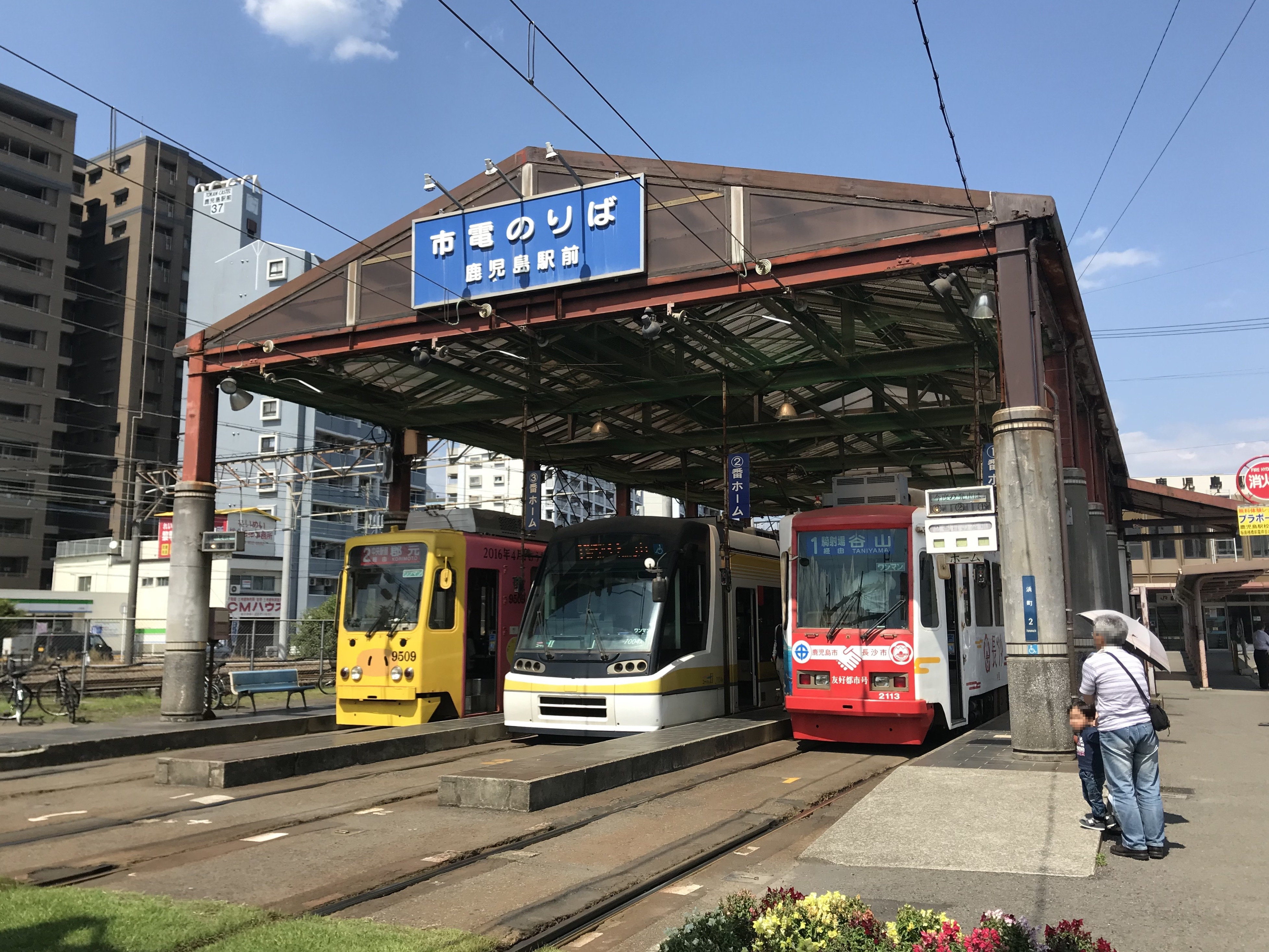 鹿児島駅前電停